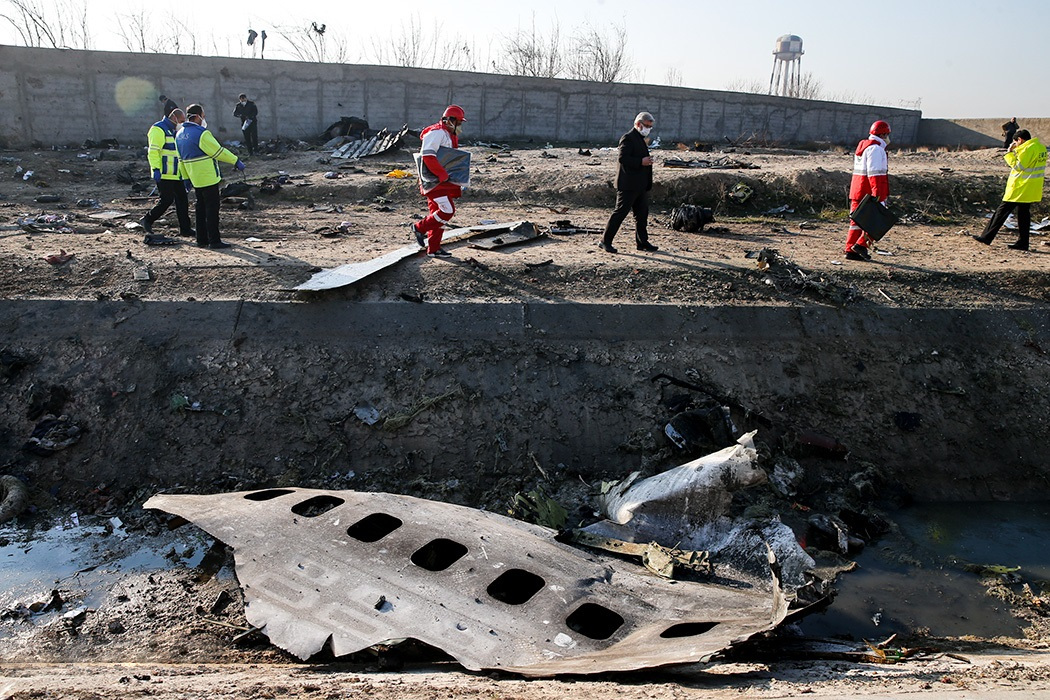 سقوط هواپیمای اوکراینی بوئینگ ۷۳۷–۸۰۰ بین شهرهای پرند و شهریار در استان تهران